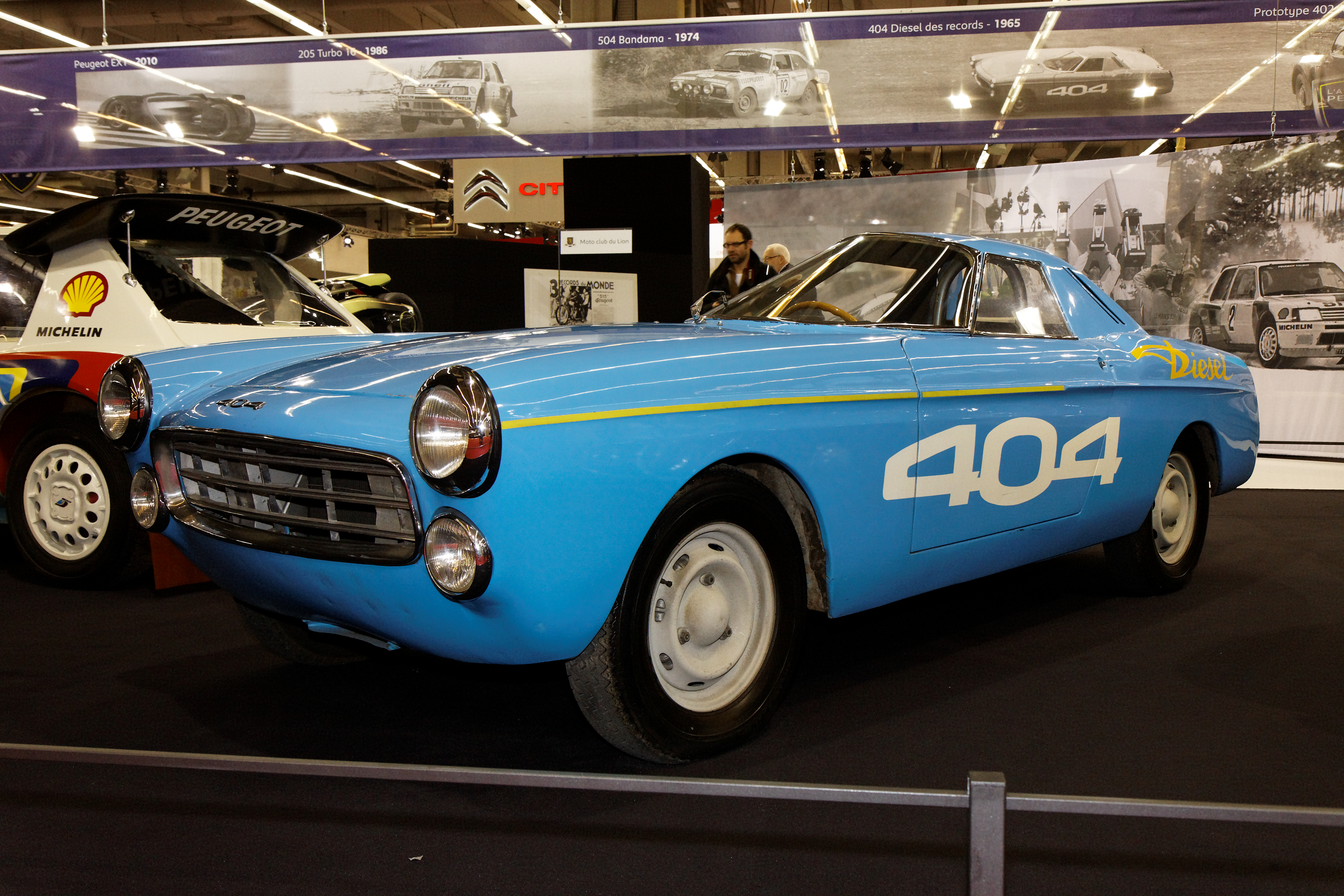 Photographie prise lors du salon rétromobile 2011 à Paris, porte de Versailles.